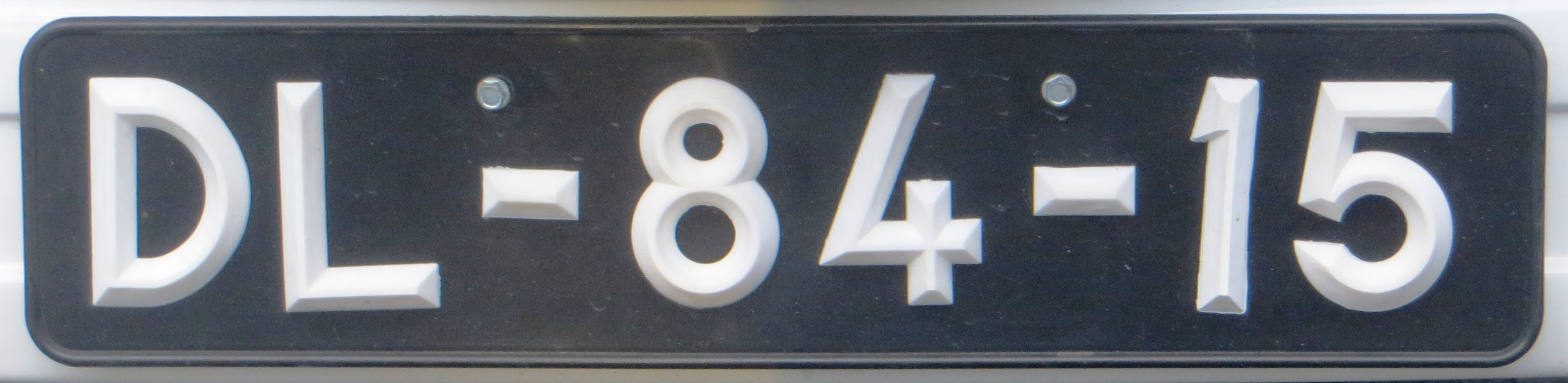 kentekenplaat Portugal oud